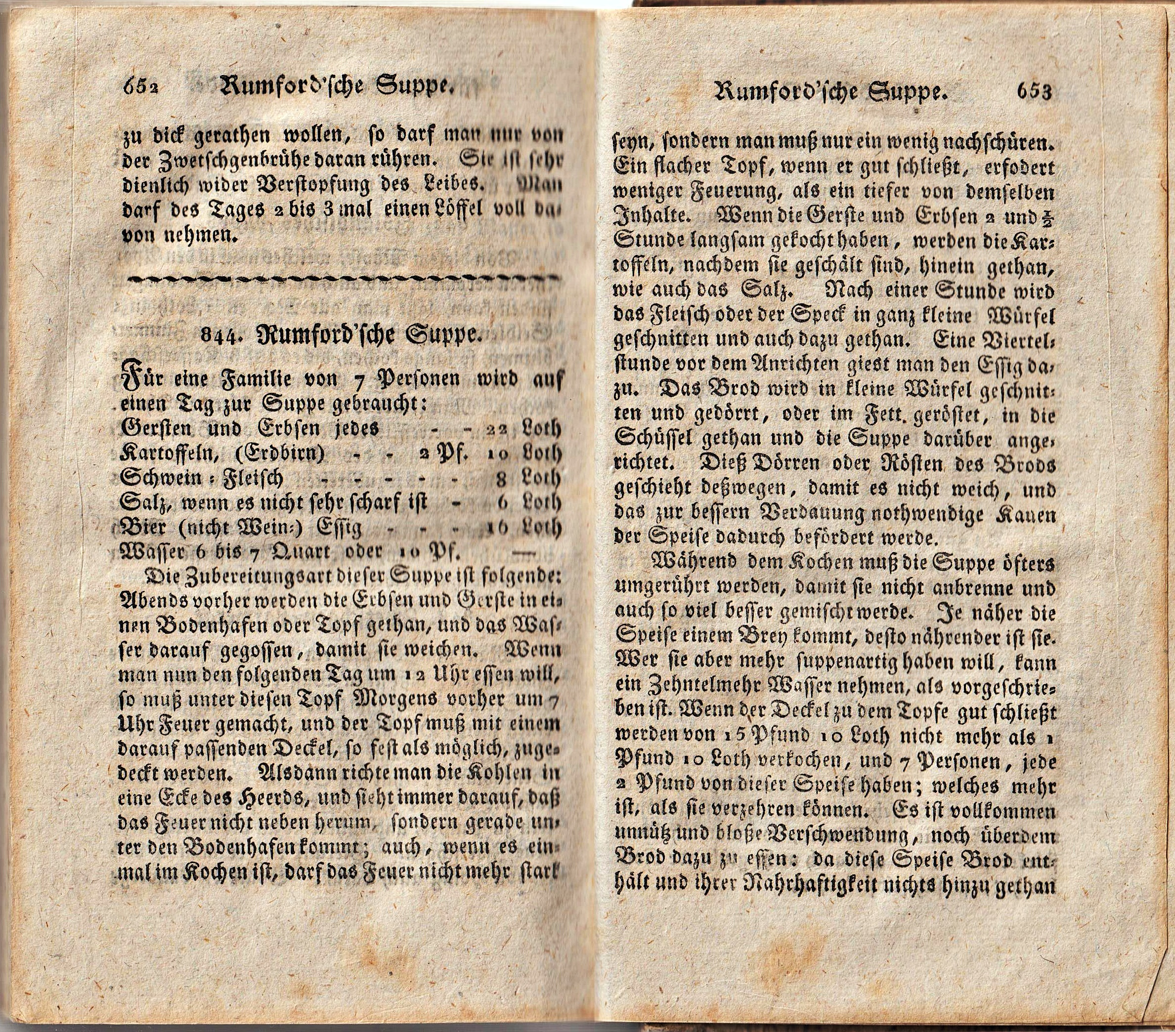 Rezept Rumford-Suppe aus Kochbuch der Sophia Juliana Weiler, Augsburg, 1810 (eigener Scan aus eigenem altem Buch)